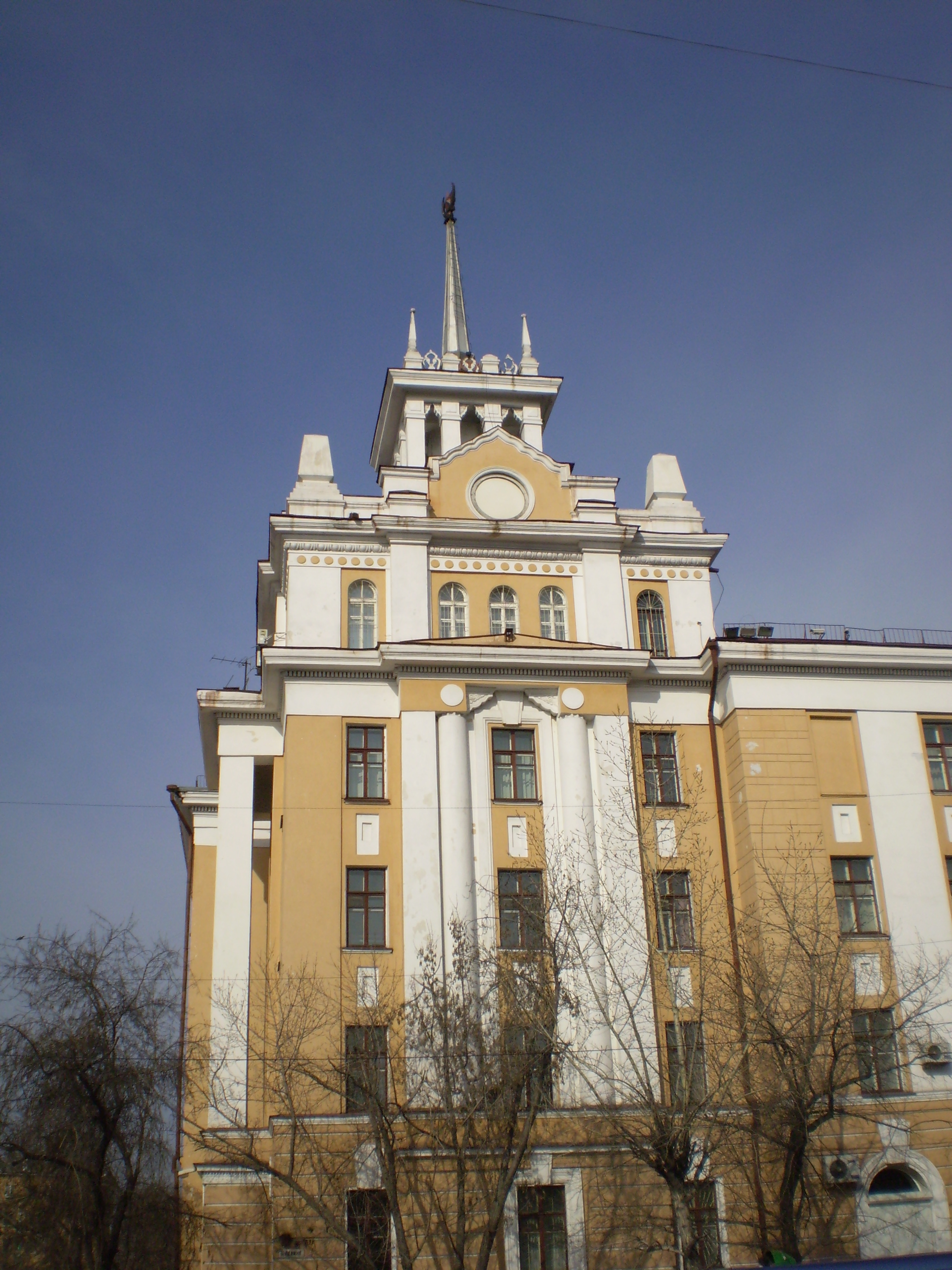 Здание Дома радио. 1955 — 1959 гг. Здание «Забайкаллеса».